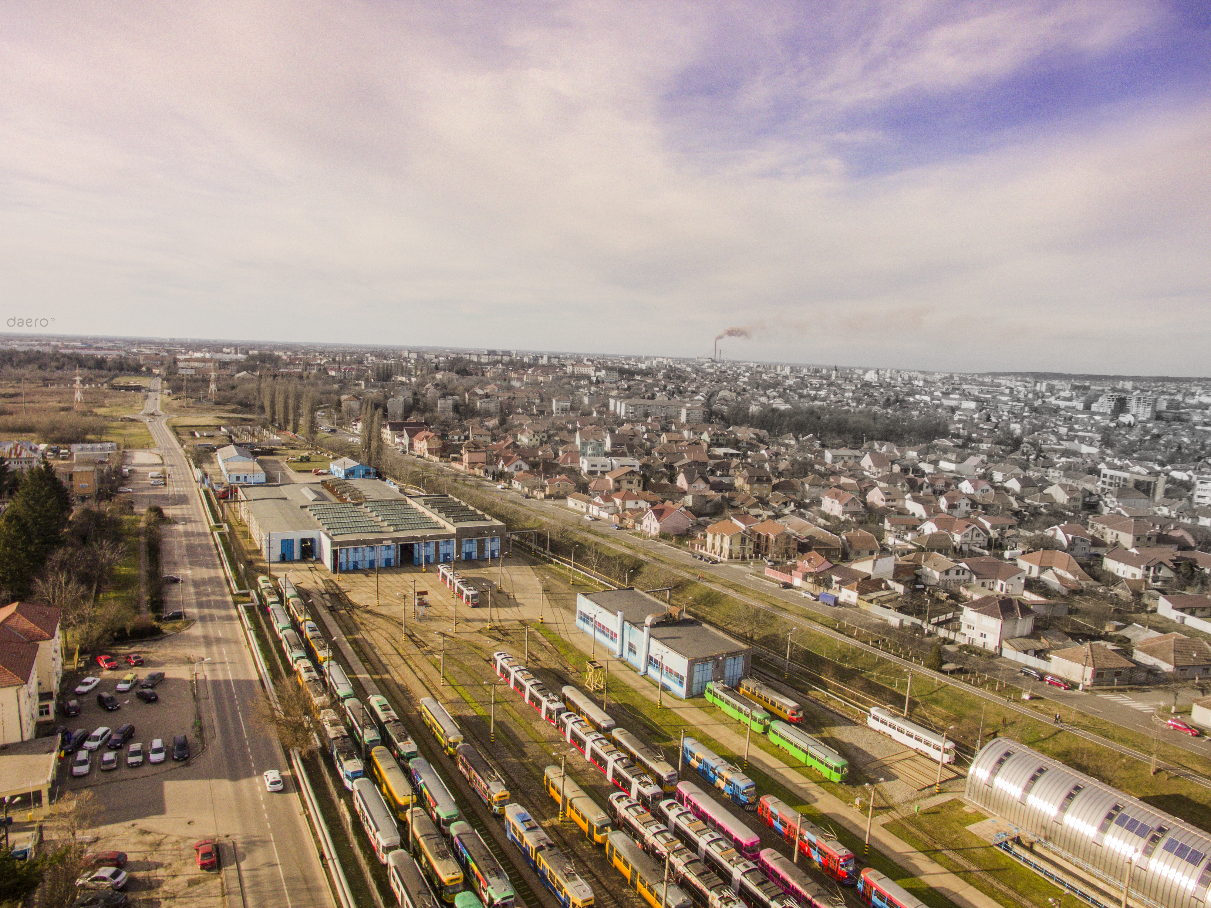 Depoul Oradea Transport Local